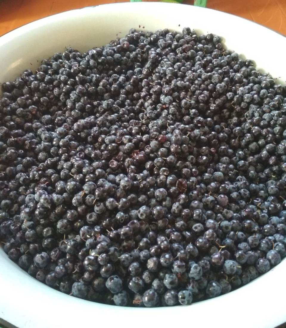 Blueberries collected in Zakamensky district of Buryatia, Russia